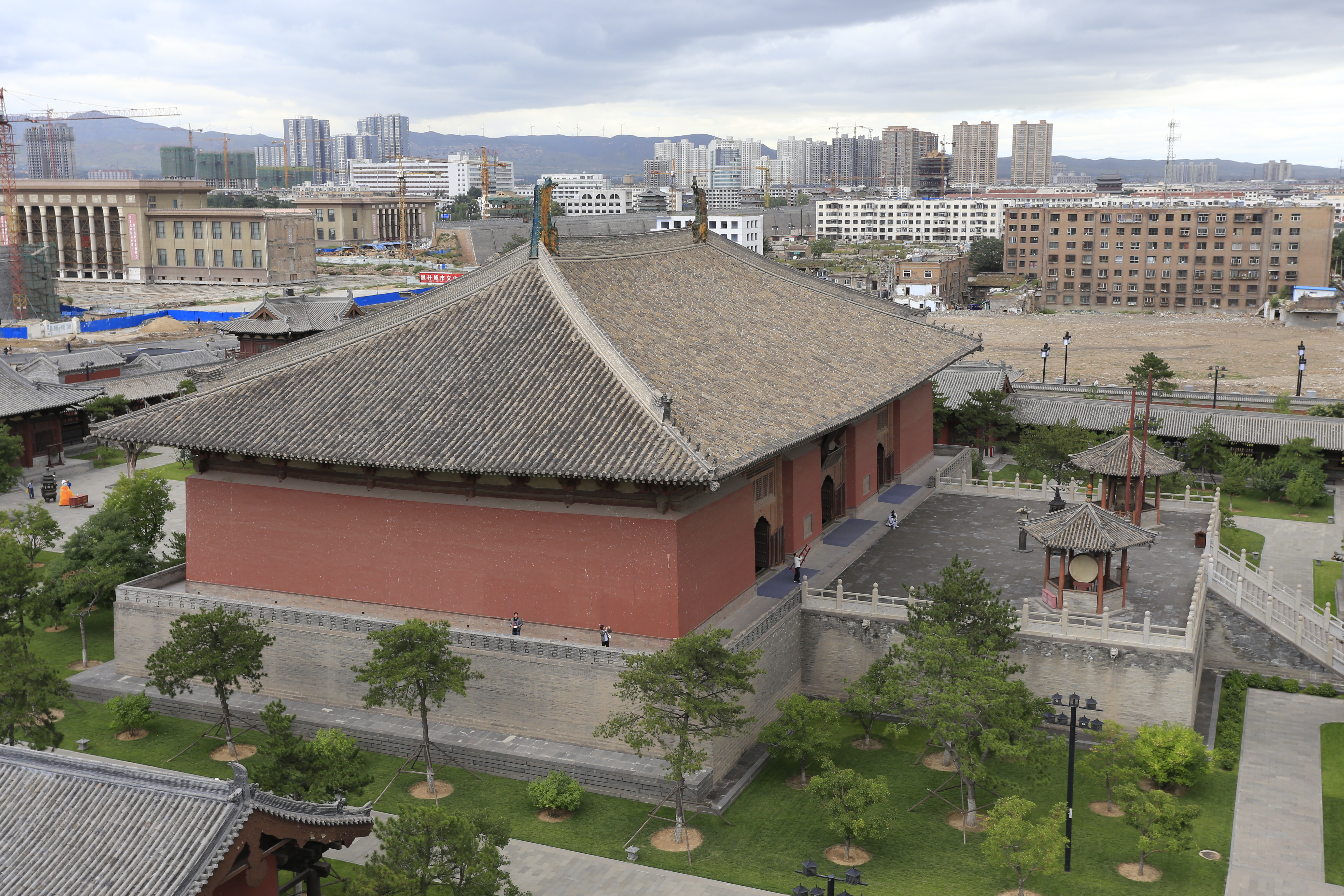 大同华严寺—— 华严宝塔上俯瞰大雄宝殿